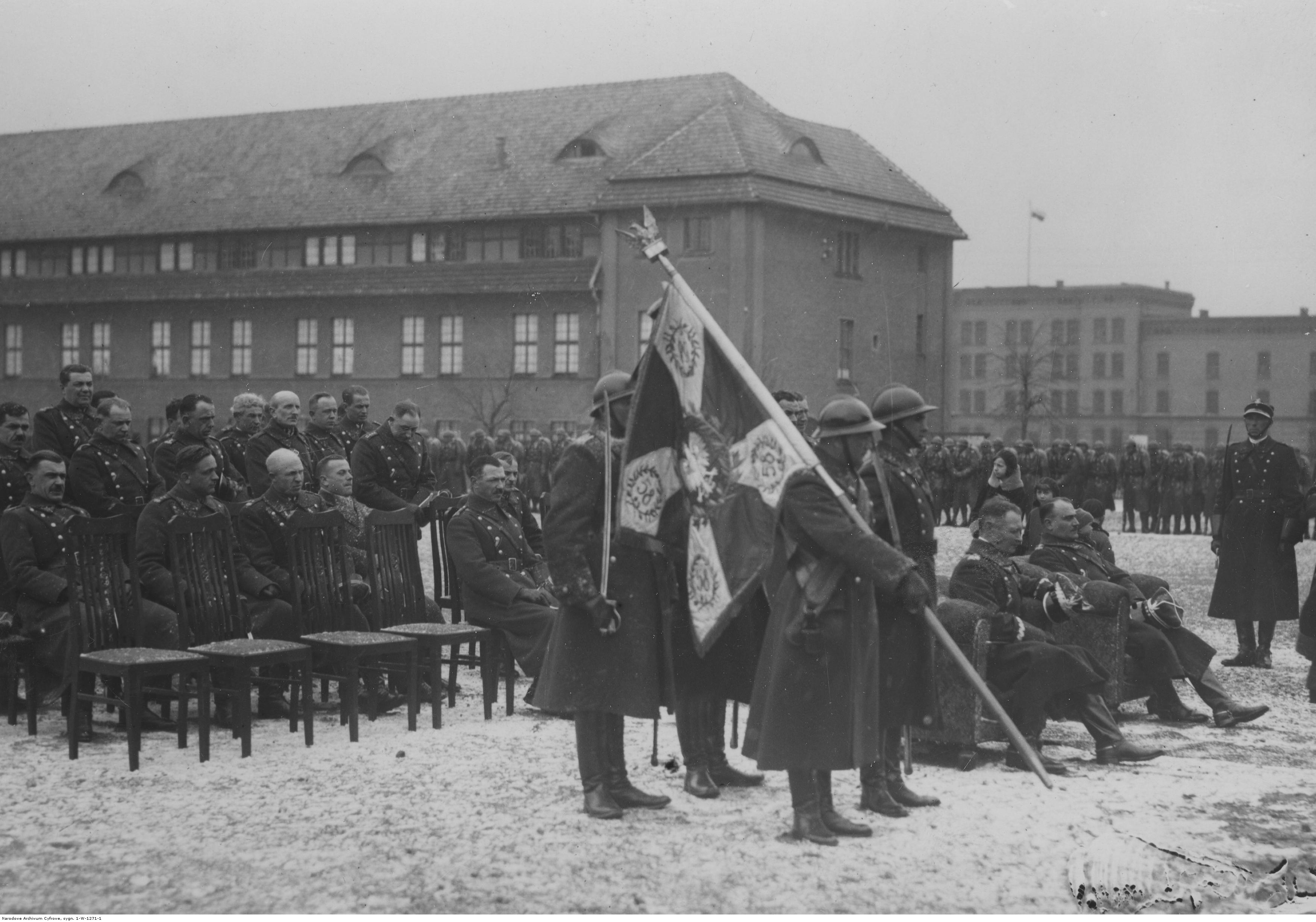 Wręczenie proporca 58 Pułkowi Piechoty Wielkopolskiej za zdobycie I miejsca w strzeleckich zawodach dywizyjnych; Poznań, marzec 1932. Dowództwo dywizyjne i pułkowe podczas mszy polowej. W fotelach siedzą gen. Kazimierz Dzierżanowski i płk Franciszek Wład. W pierwszym rzędzie krzeseł siedzi płk Franciszek Alter. Koncern Ilustrowany Kurier Codzienny - Archiwum Ilustracji. Sygnatura: 1-W-1271-1